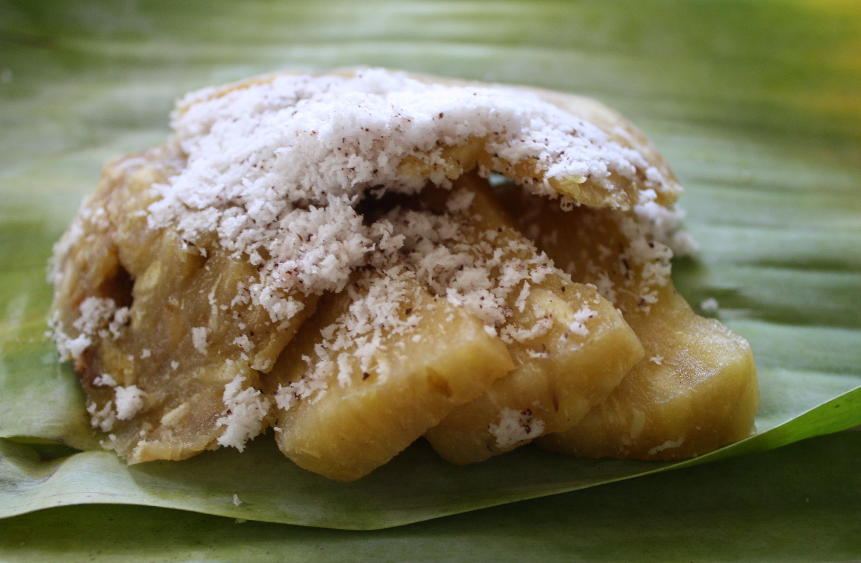 Gemblong adalah makanan khas dari Jawa Tengah yang terbuat dari ketela pohong.